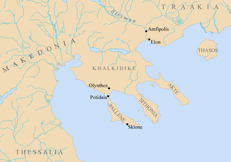 Khalkidiken niemimaa Peloponnesolaissodan aikana.